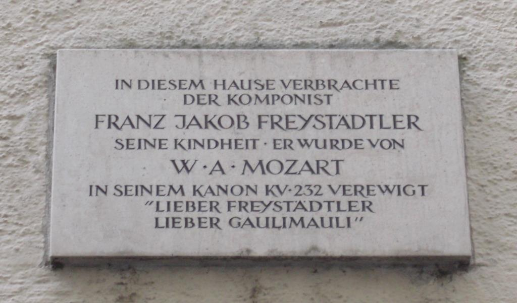 Plakette für den Komponisten und Klavierpädagogen Franz Jakob Freystädtler (1761-1841) in Salzburg, Goldgasse 14